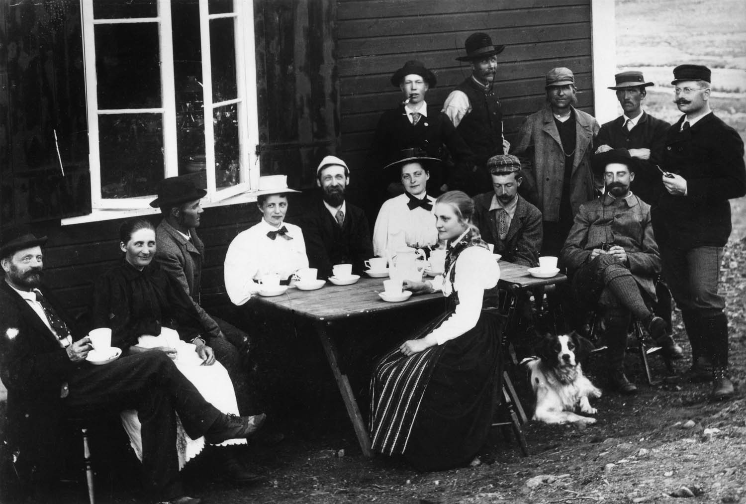 Depicted person: Johan Lindström Saxon, Publicist, Svensk (1859-1935); Johan Lindström (till 1901); JL Saxon; Folke Wancke (1854-12-02-1948-07-06) Depicted place: Jämtland, Sylarna (Sverige (SE))